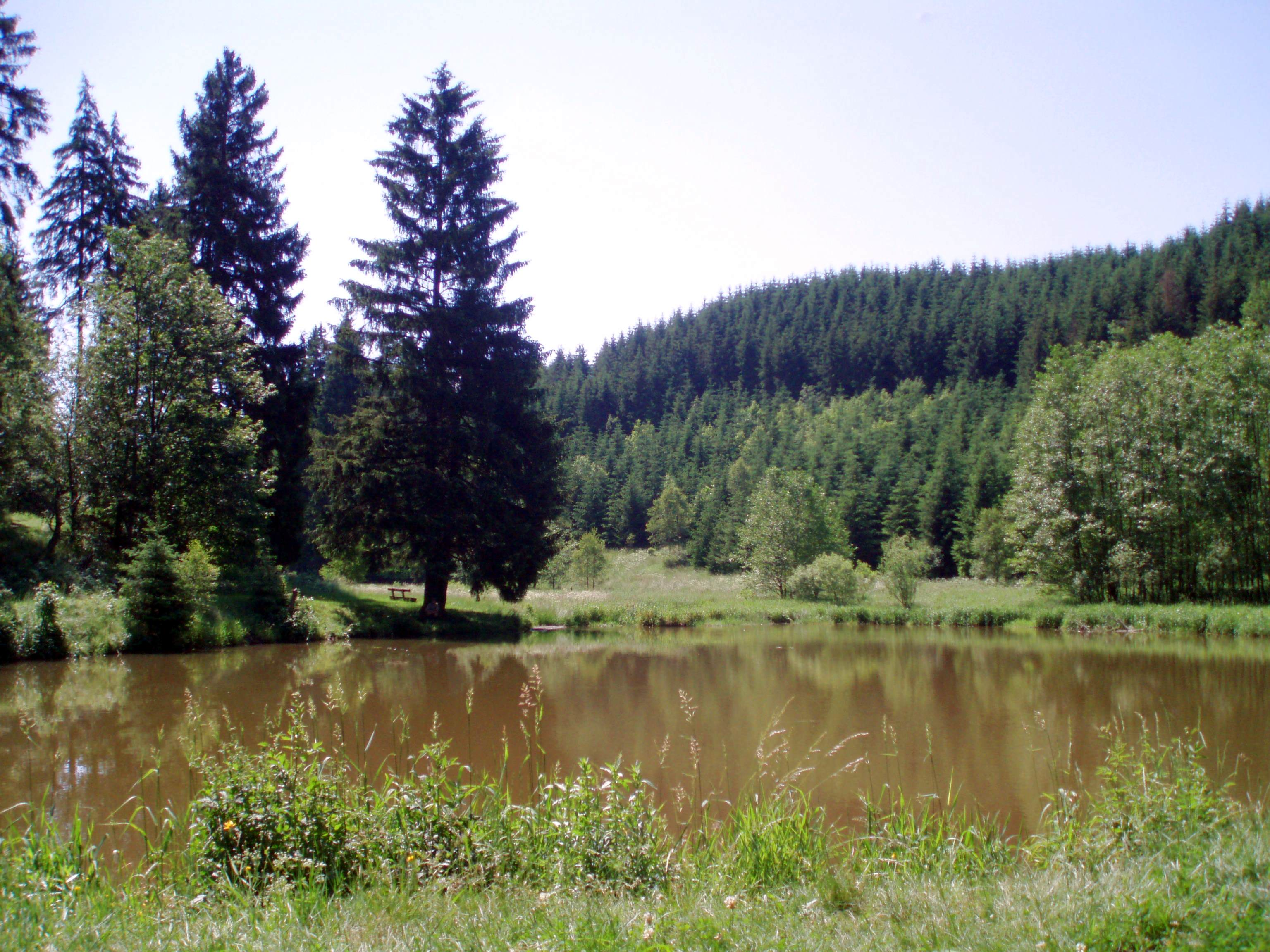 Katzsohlteich